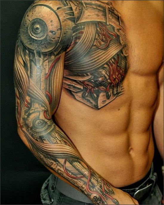 chest tattoo